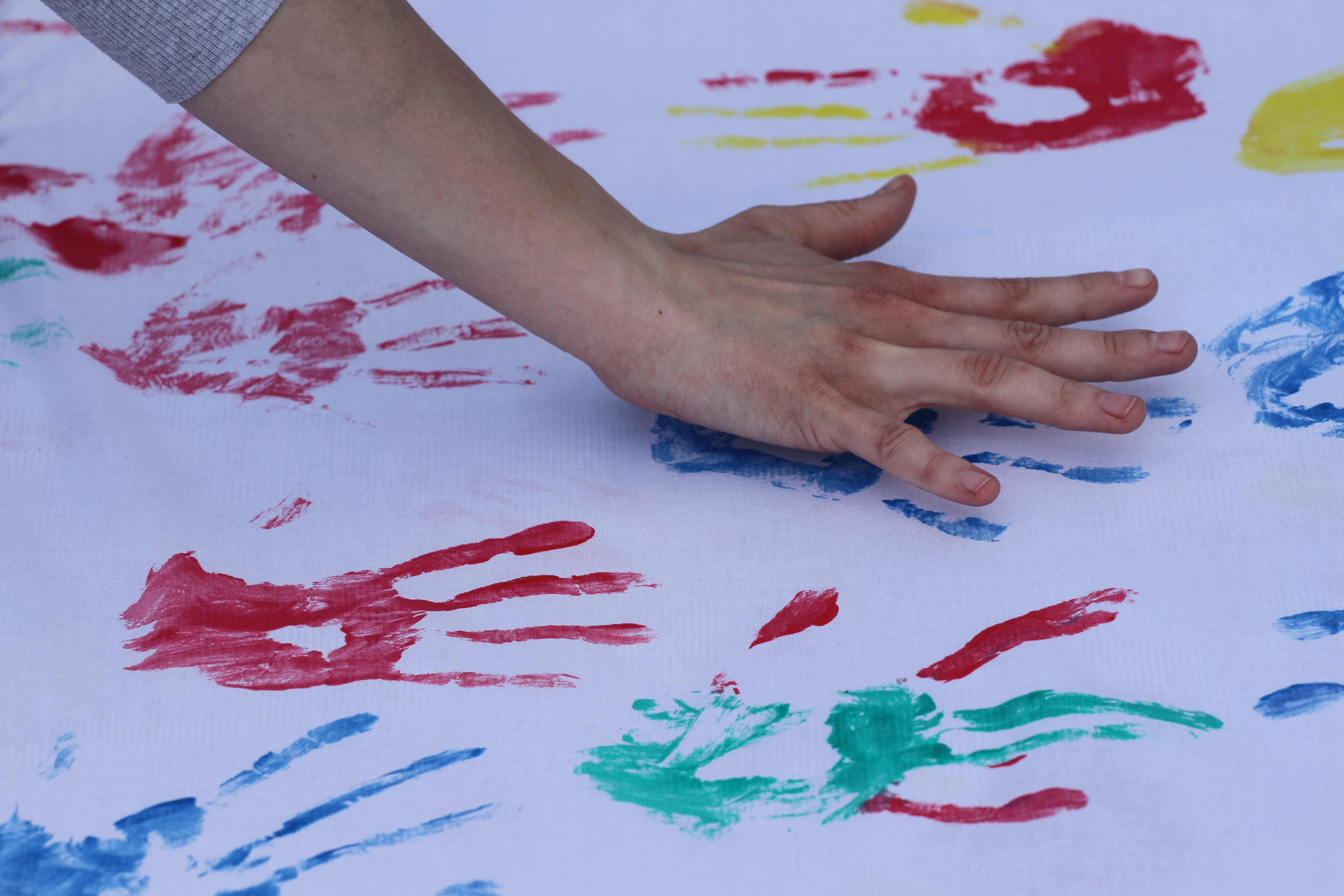 Felelős Állattartás Napja, kézzel pecsételés